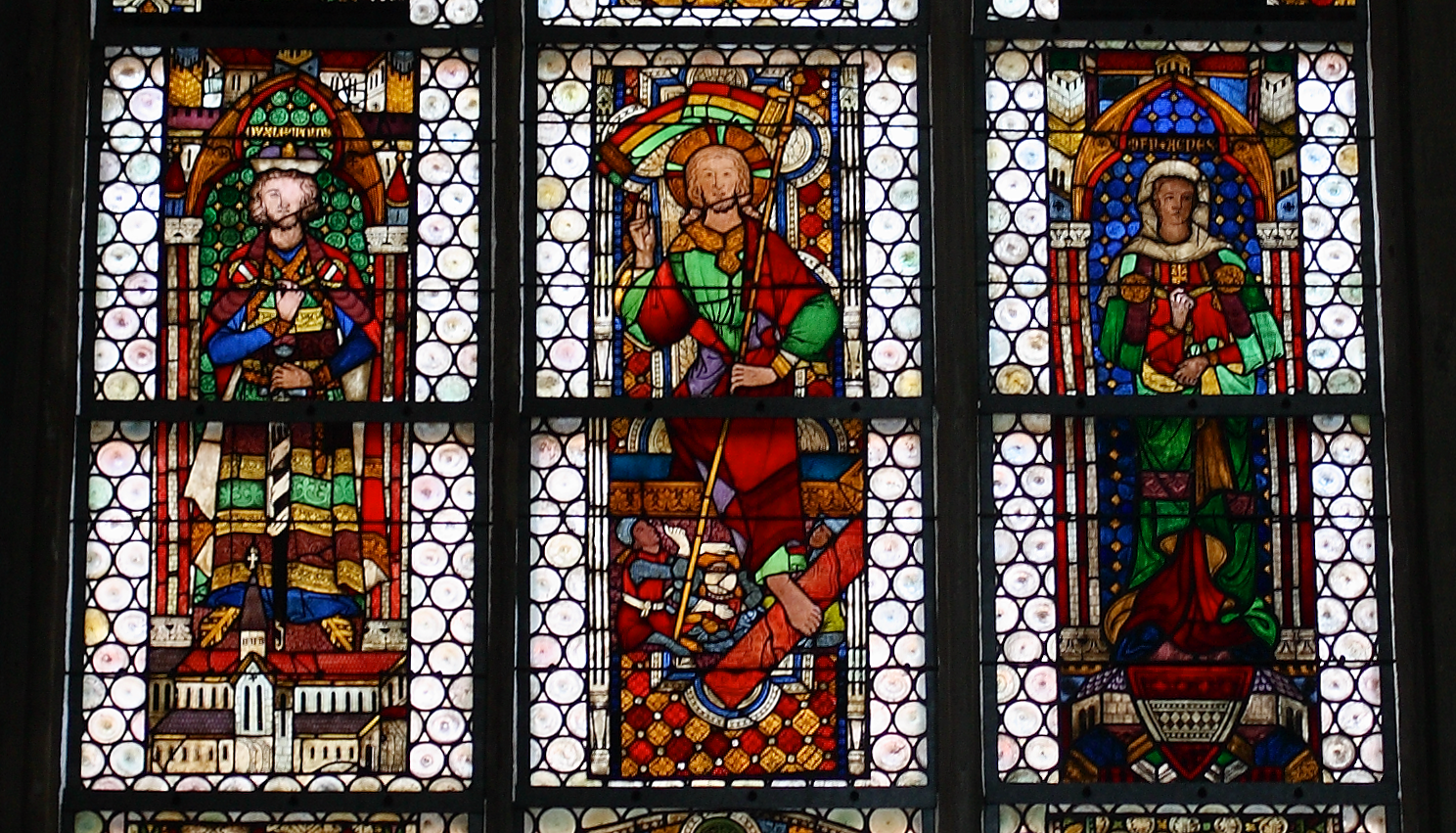 Detail des Laxenburger Fensters in der Stadtpfarrkirche Steyr: Darstellungen Herzog Leopolds, des auferstehenden Christus und Markgräfin Agnes von um 1300. Diese zeigen an den Gewandsäumen bereits den frühgotischen schönlinigen Stil. Das Bild der Markgräfin ist teilweise modern ergänzt (untere Hälfte, Gesichtszüge, Teile der Architektur).[1]